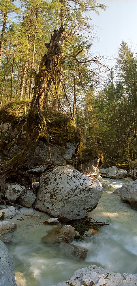 Ramsauer Ache im Zauberwald im Berchtesgadener Land